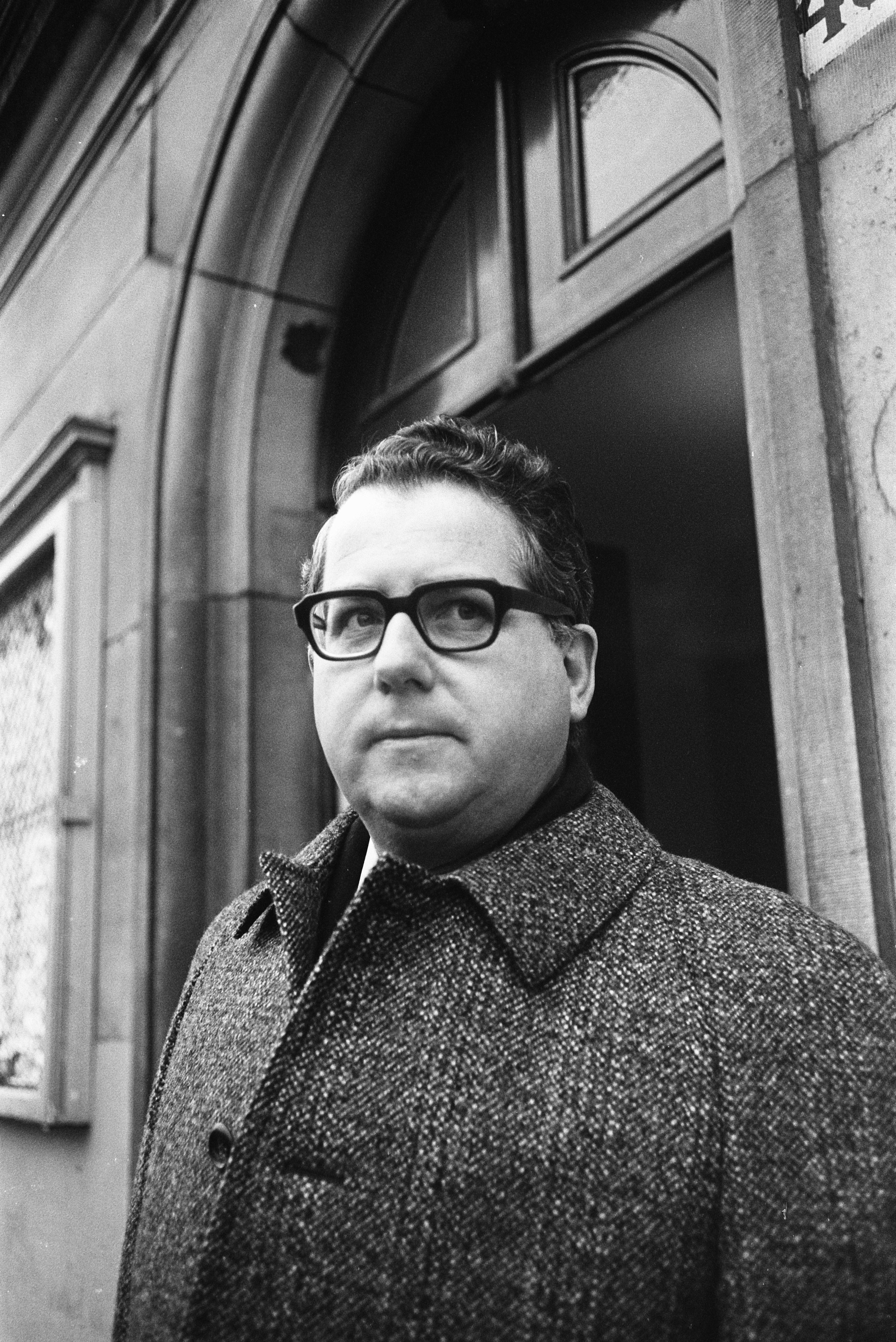 Collectie / Archief : Fotocollectie Anefo Reportage / Serie : [ onbekend ] Beschrijving : Kort geding van de Volkskrant tegen mr. Hilterman in ho beroep voor de rechtbank Amsterdam. Drs. J. J. M. van de Pluim van de Volkskrant Datum : 12 december 1969 Locatie : Amsterdam, Noord-Holland Trefwoorden : rechtbanken Fotograaf : Koch, Eric / Anefo Auteursrechthebbende : Nationaal Archief Materiaalsoort : Negatief (zwart/wit) Nummer archiefinventaris : bekijk toegang 2.24.01.05 Bestanddeelnummer : 923-0698